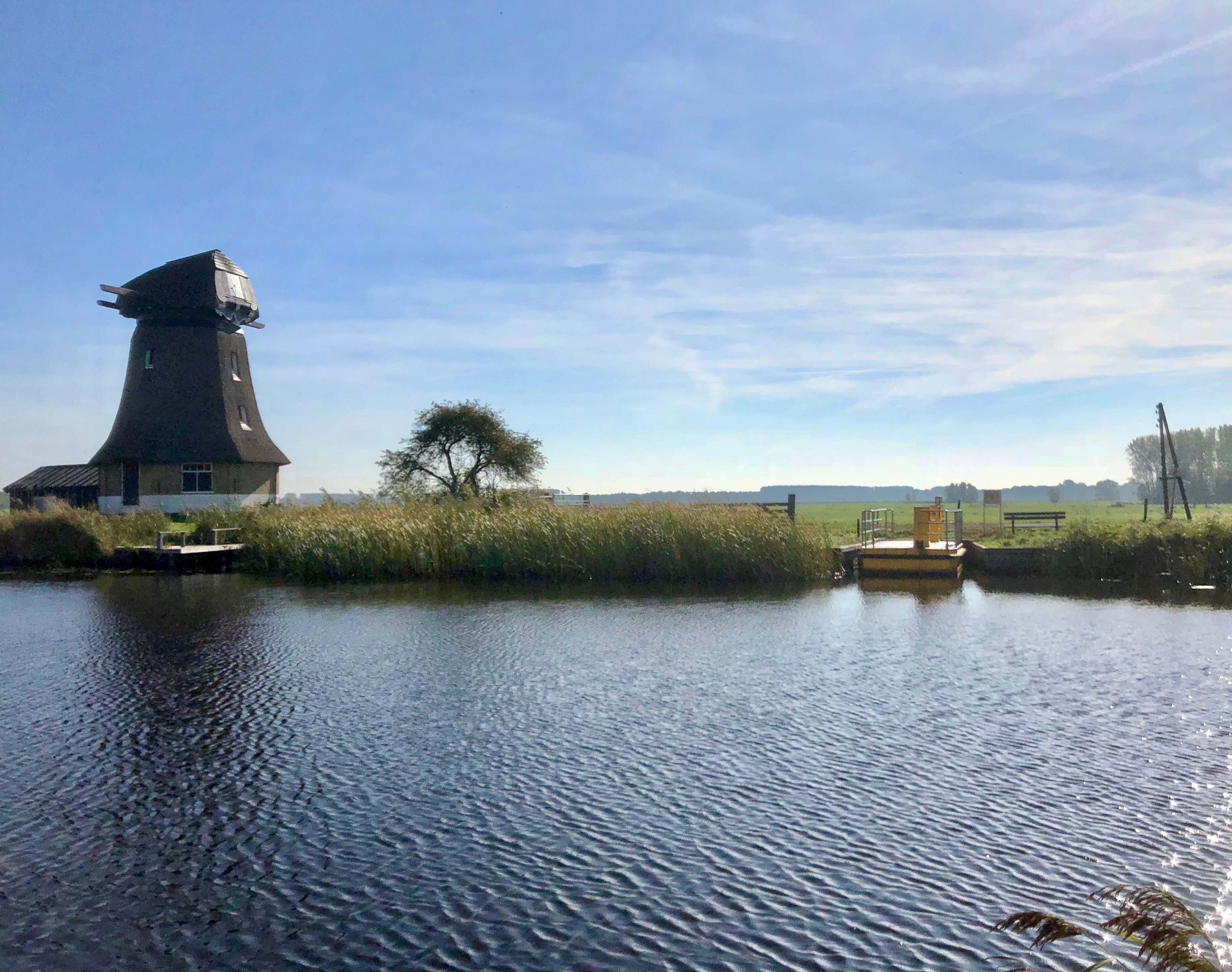 Zicht op de voormalige boezemmolen bij de Ulesprong aan de Nije Feart